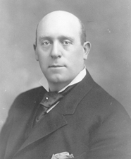 Senator portrait